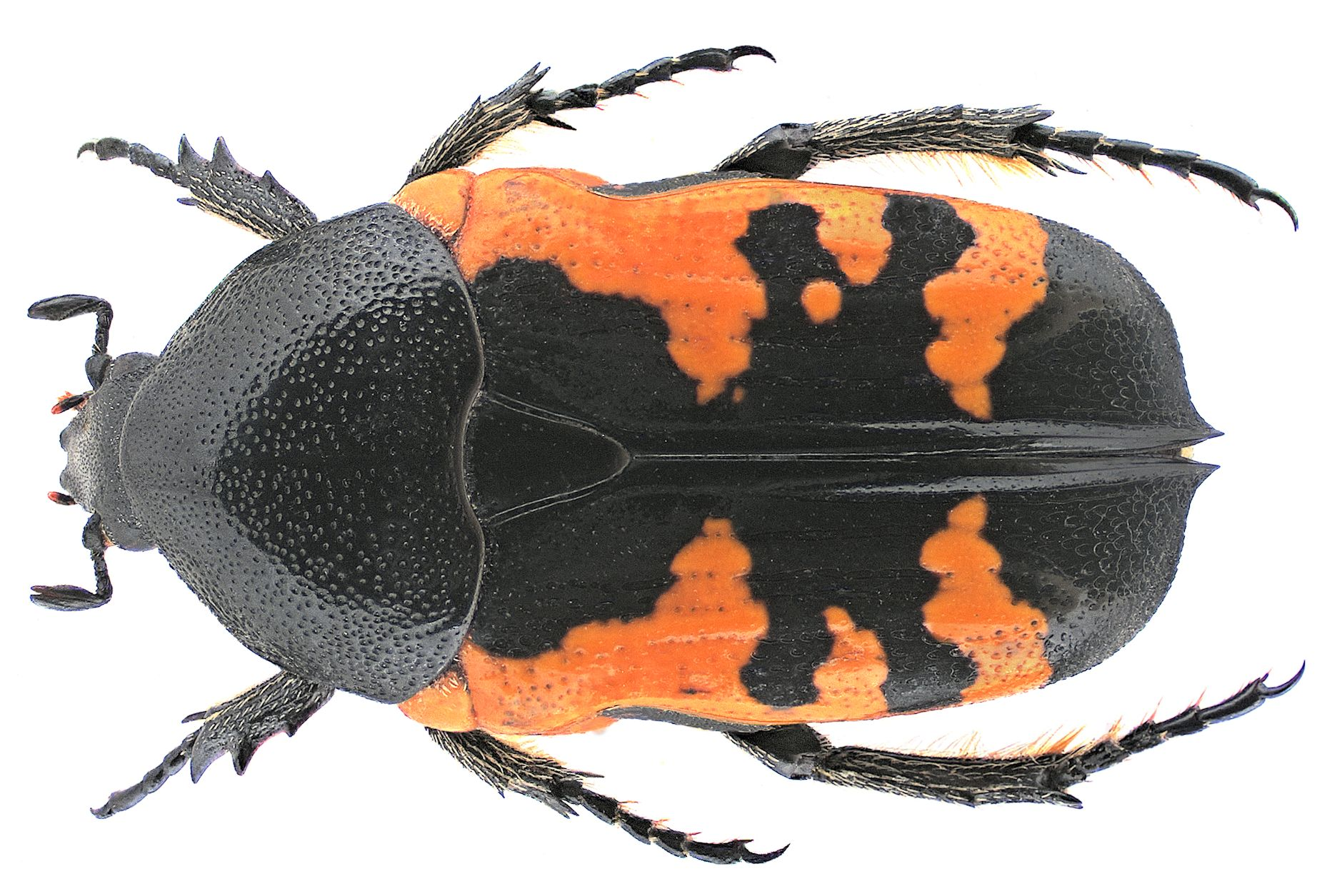 Familie: Scarabaeidae Groesse: 16 mm Verbreitung: West- und Ostafrika Fundort: Senegal, M`Bour leg.det. U.Schmidt, 1992 Photo: U.Schmidt, 2006